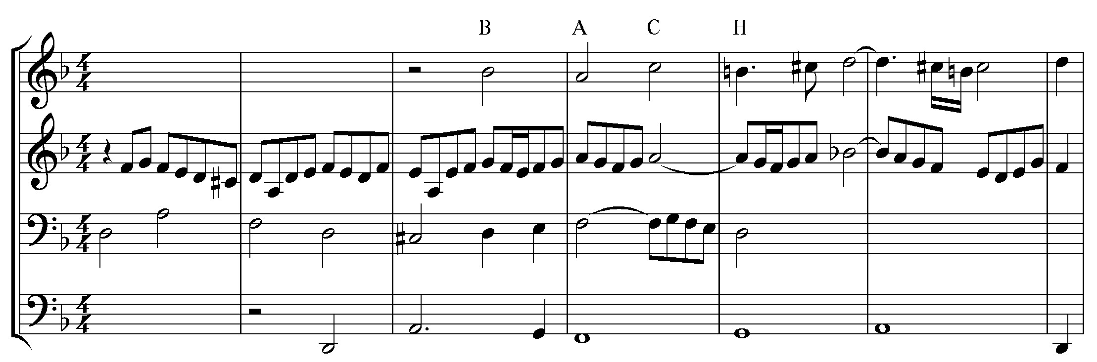 Kunst der Fuge, Quadrupelkomplex